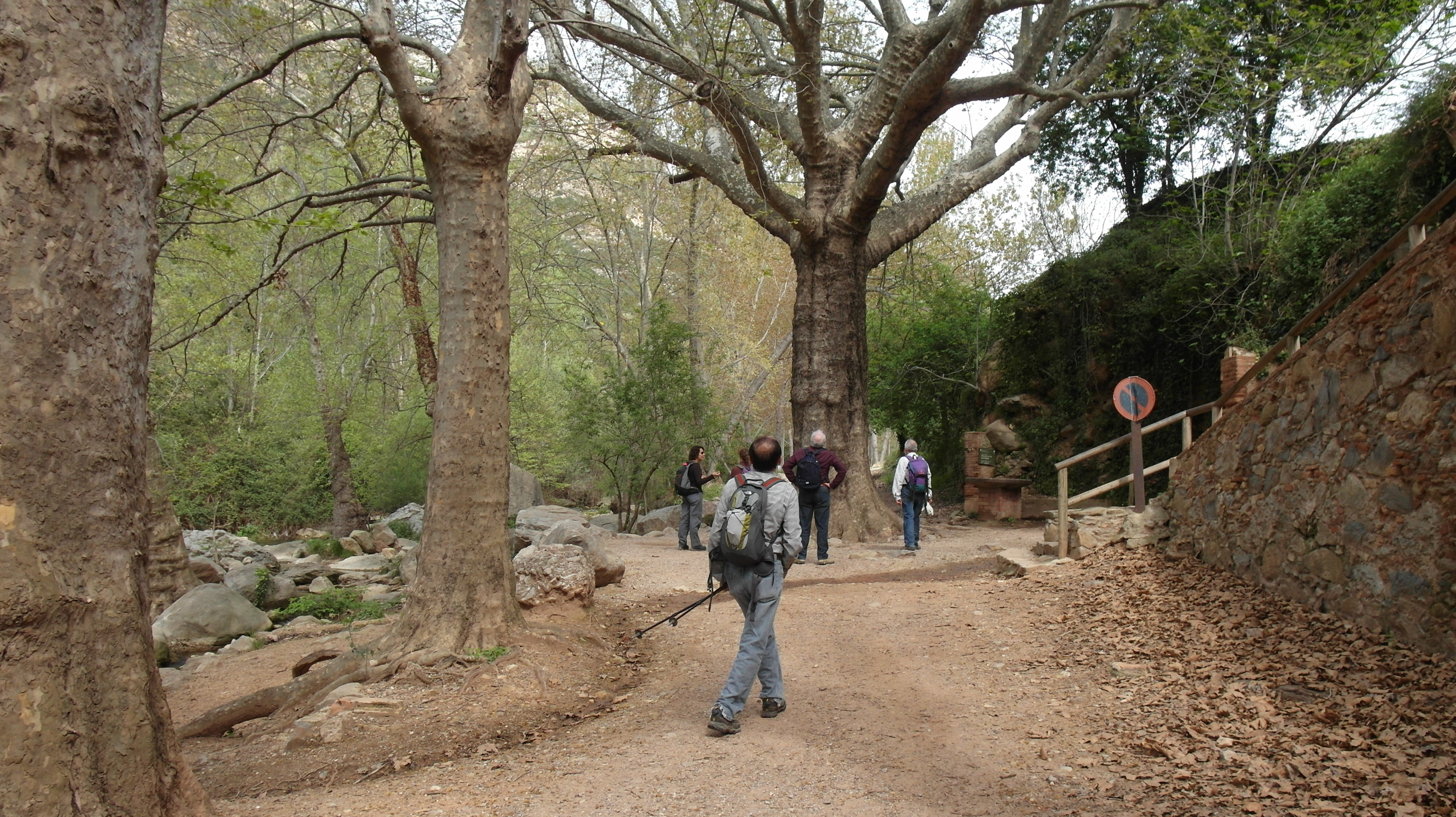 Riu Tenes - el plàtan de la font de la Pineda - Vall de Sant Miquel del Fai